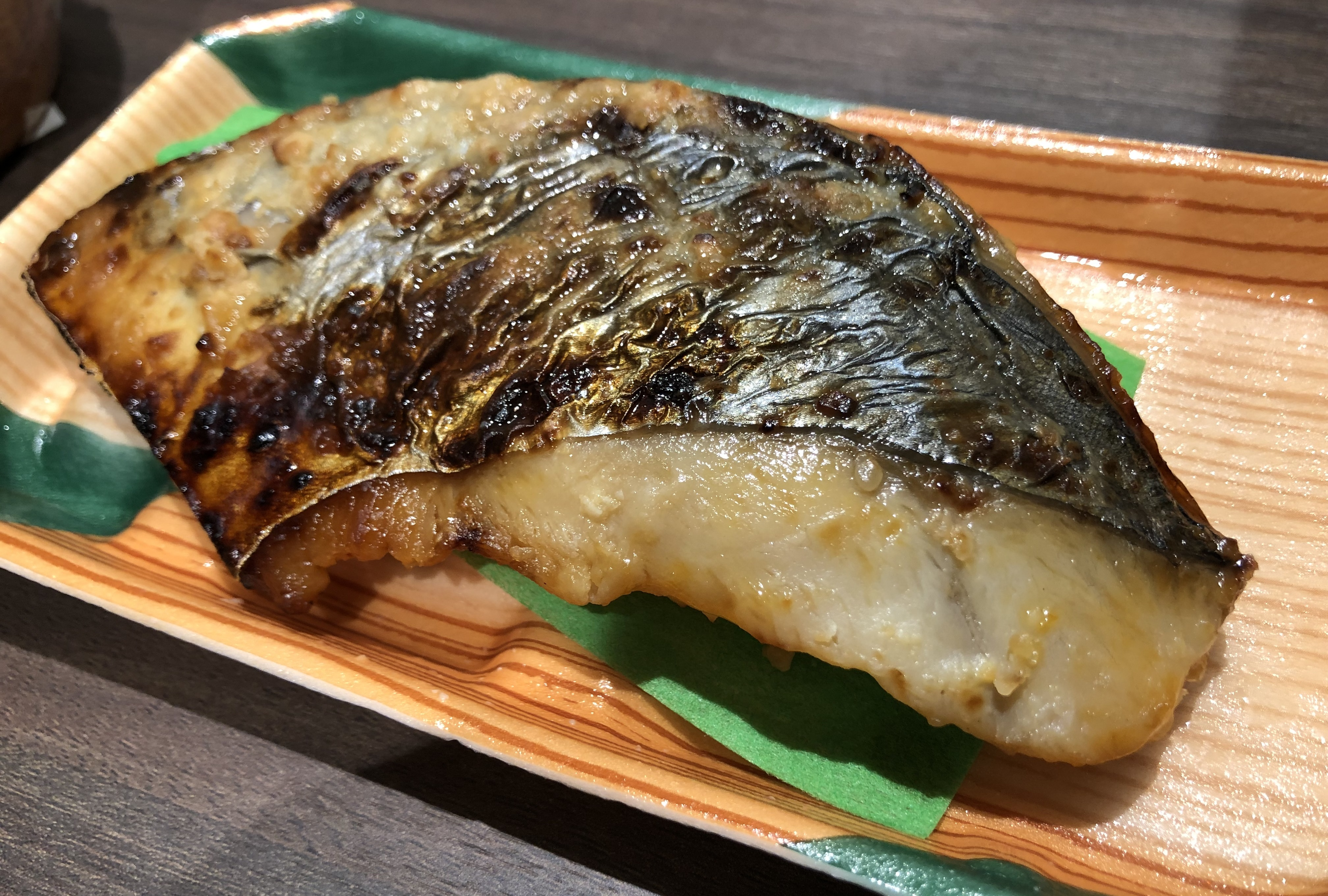 サワラのja:西京味噌焼き。見ての通りお惣菜です。